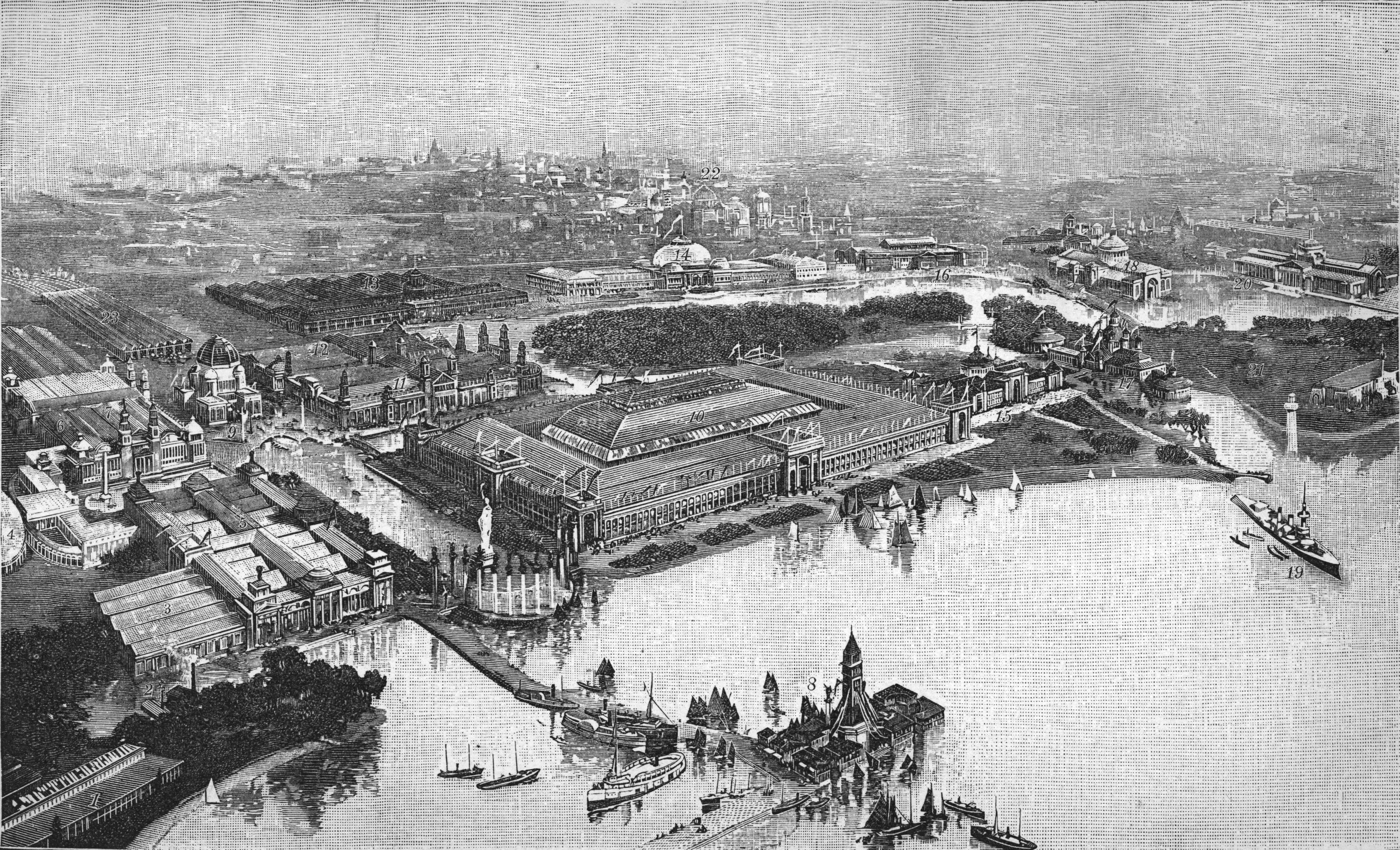 World exhibition in Chicago, 1893 (birds view) de: Weltausstellung in Chicago, 1893. Aus der Vogelschau. 1. Milcherei. 2. Sägemühlen. 3. Forstwesen. 4. Versammlungshalle. 5. Landwirtschaft. 6. Triebkraft u.s.w. 7. Maschinenhalle. 8. Kasino, Konzerthaus. 9. Verwaltungsgebäude. 10. Industrie und Freie Künste. 11. Elektricität. 12. Bergwerke. 13. Transportwesen. 14. Gartenbau. 15. Vereinigte Staaten. 16. Frauenpalast. 17. Fischerei und Aquarium. 18. Illinois-Staatsgebäude. 19. Modell eines Kriegsschiffs. 20. Kunstgalerie. 21. Raum für Gebäude anderer Staaten und Nationen. 22. Straße von Kairo, Maoridorf u.s.w. 23. Bahnhof